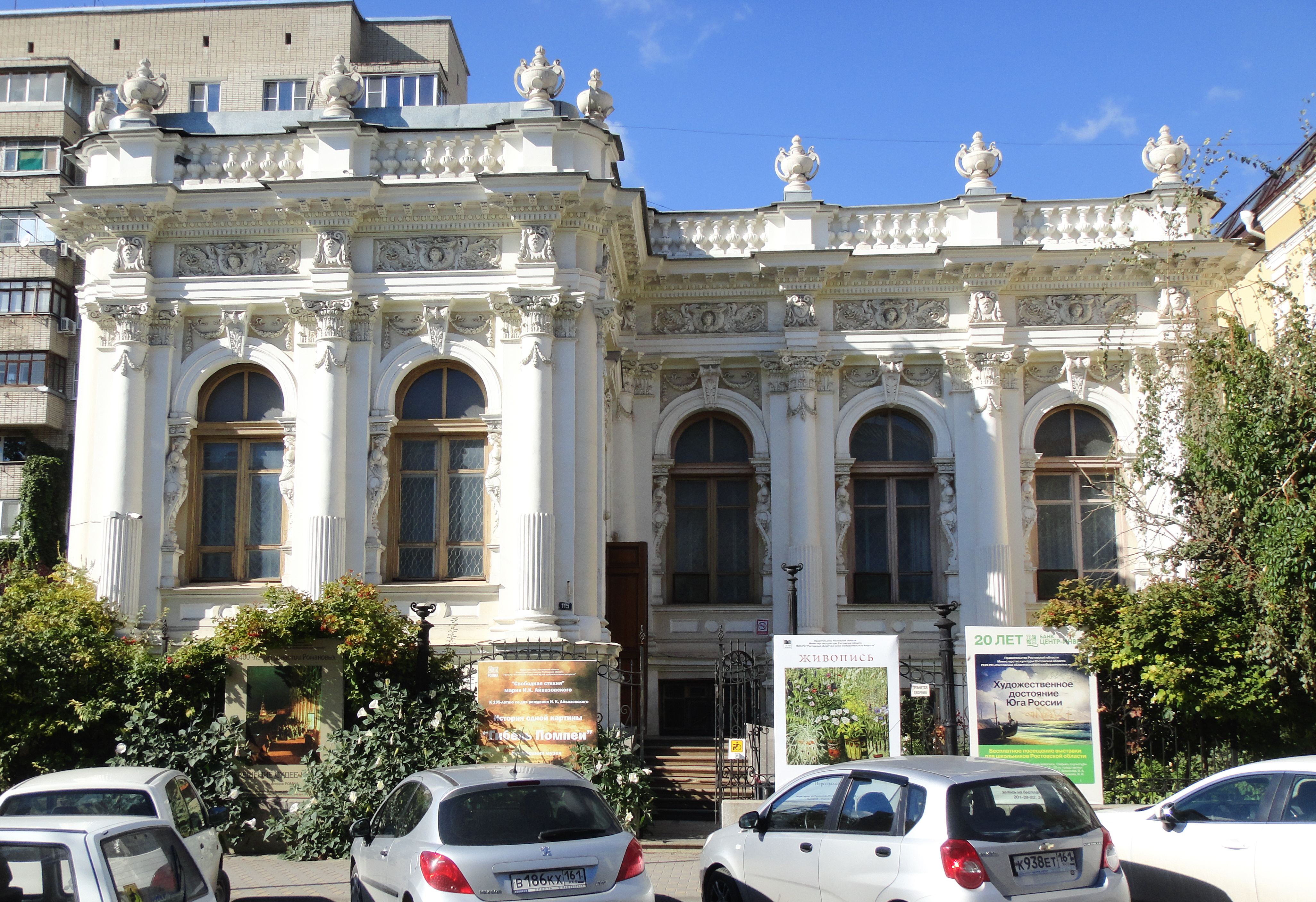 Особняк домбровского (Ростовская область, Ростов-на-Дону, пушкинская улица, 115)